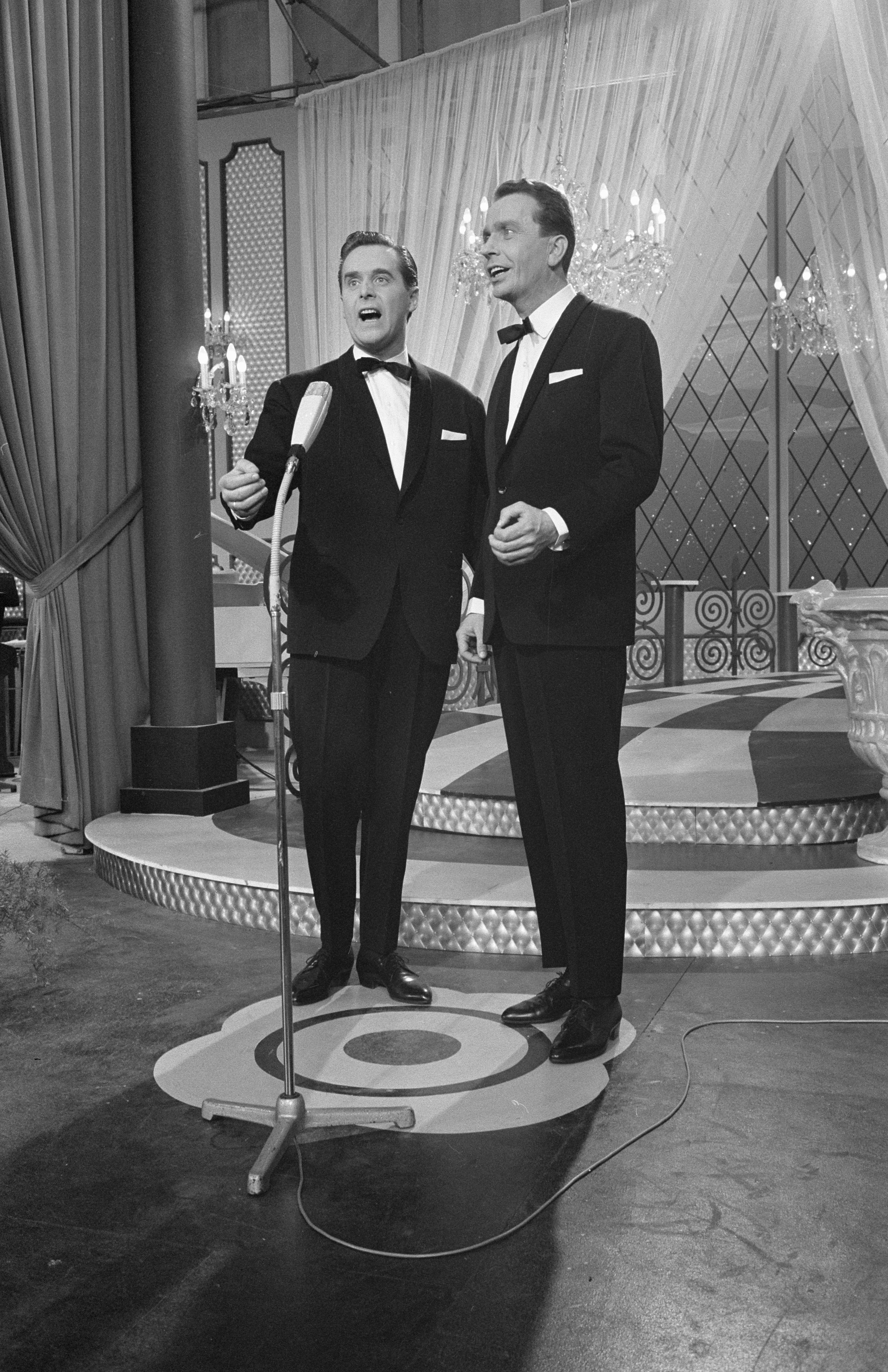 Collectie / Archief : Fotocollectie Anefo Reportage / Serie : [ onbekend ] Beschrijving : Eurovisie Songfestival 1962 te Luxemburg, voor Nederland De Spelbrekers Datum : 18 maart 1962 Locatie : Luxemburg Trefwoorden : artiesten, muziek, songfestivals Instellingsnaam : Spelbrekers Fotograaf : Pot, Harry / Anefo Auteursrechthebbende : Nationaal Archief Materiaalsoort : Negatief (zwart/wit) Nummer archiefinventaris : bekijk toegang 2.24.01.05 Bestanddeelnummer : 913-6589 Reacties Geplaatst door Maaike op 19 juli 2012 - 20:46. De Spelbrekers zijn de zangers Theo Rekkers en Huug Kok. De Spelbrekers met het liedje Katinka, wat geen enkel punt kreeg toegekend.